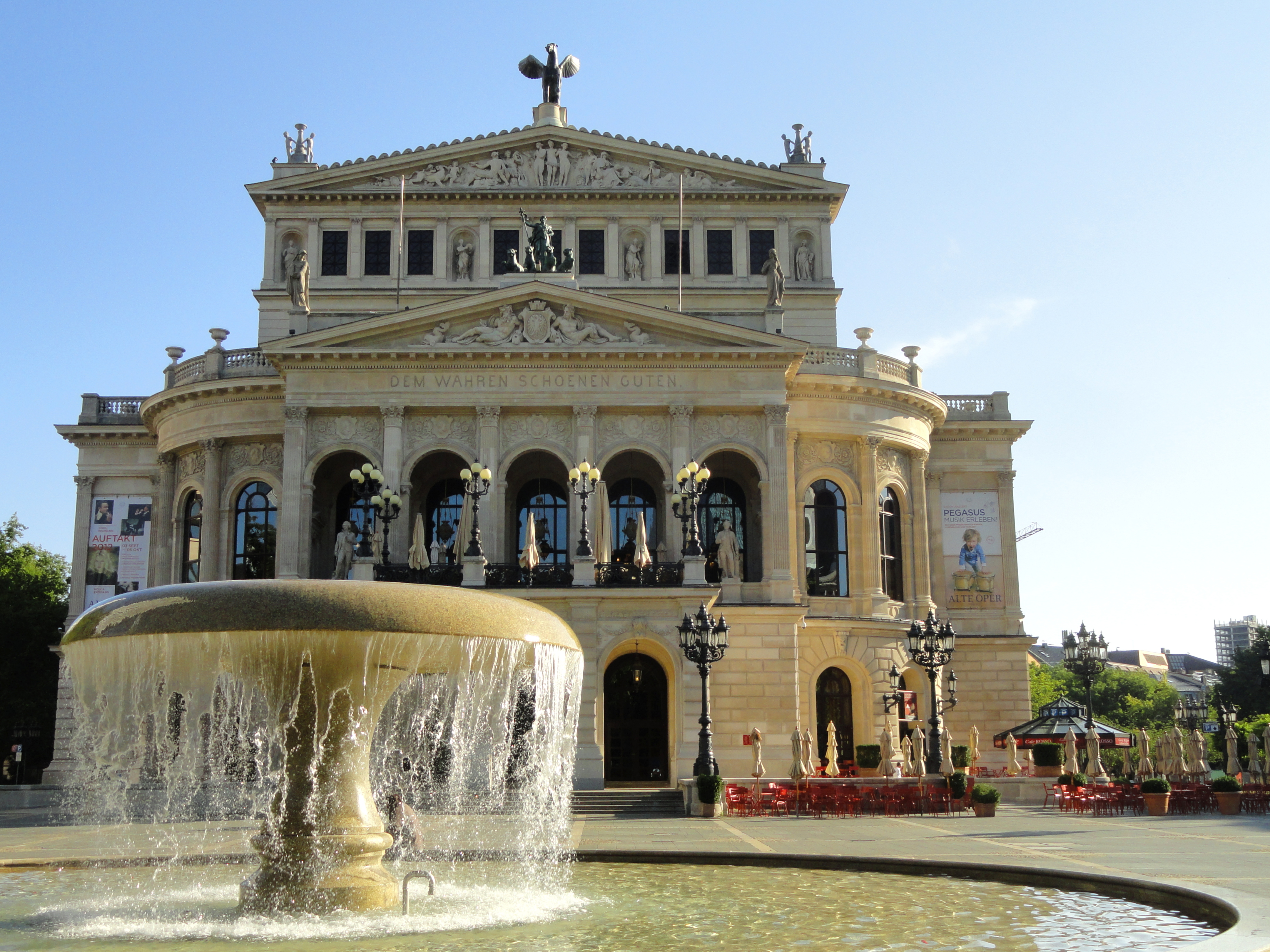 Alte Oper, Frankfurt am Main, Germany.